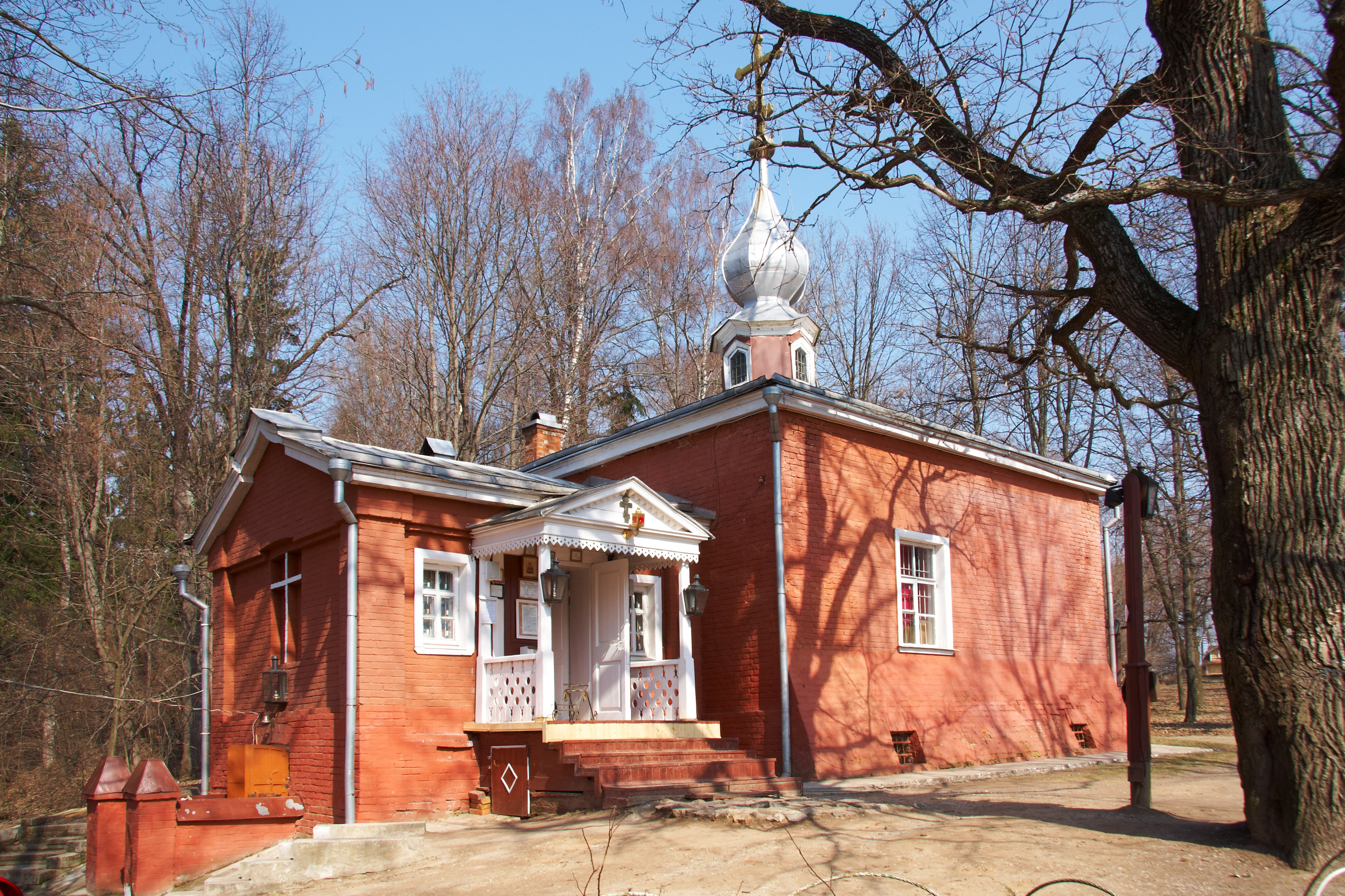 Храм Спаса Нерукотворного образа в усадьбе Мураново (Пушкинский район Московской области).